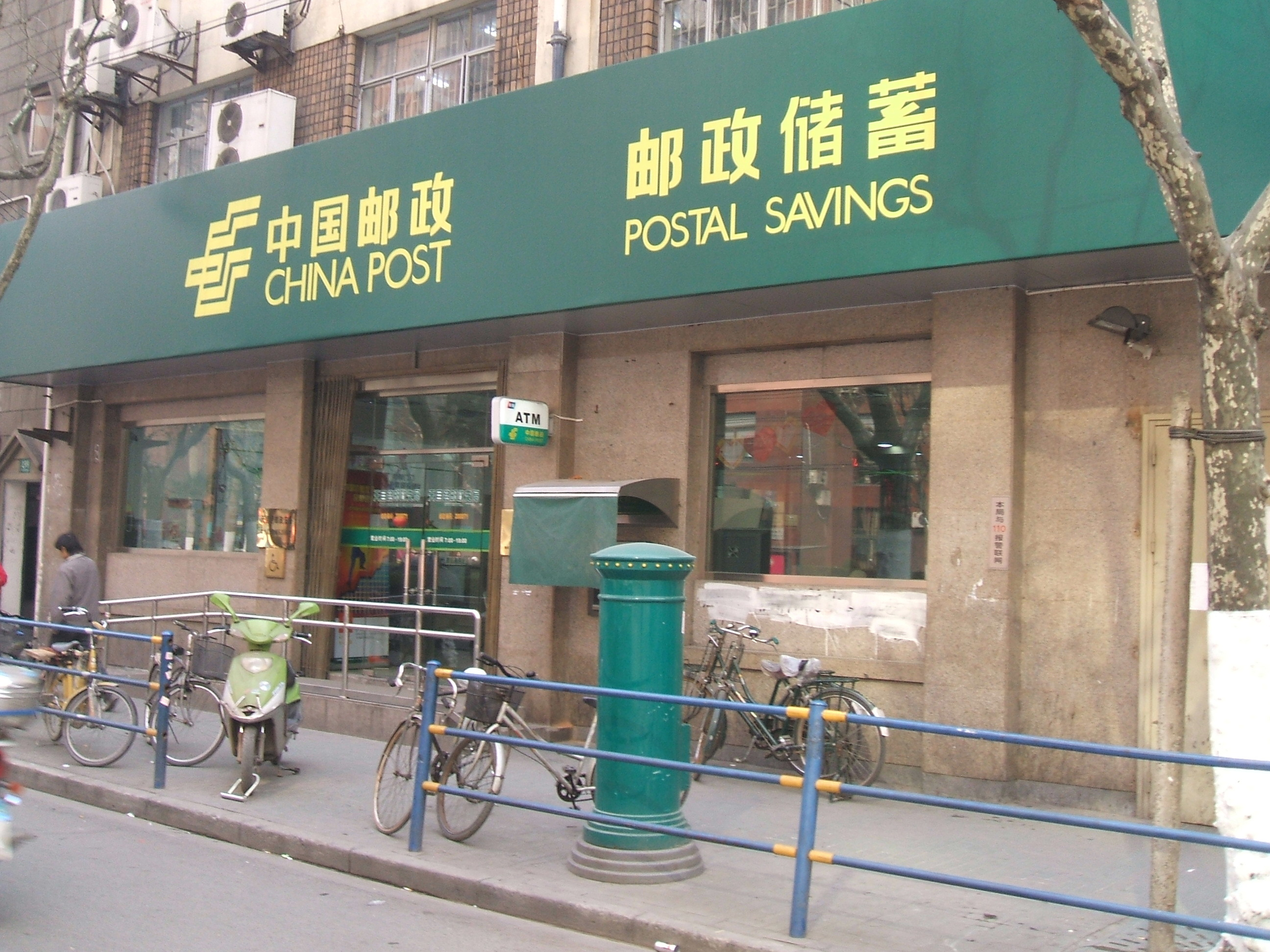 中文（中国大陆）: 中華人民共和国上海にある中国郵政天目路郵便支局の外観